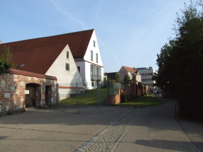 Das Memminger Antoniterkloster von der Seite stadtauswärts